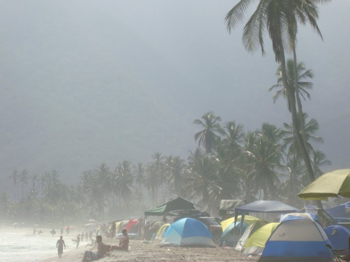 Playa de Cuyagua, estado Aragua - Venezuela 2009